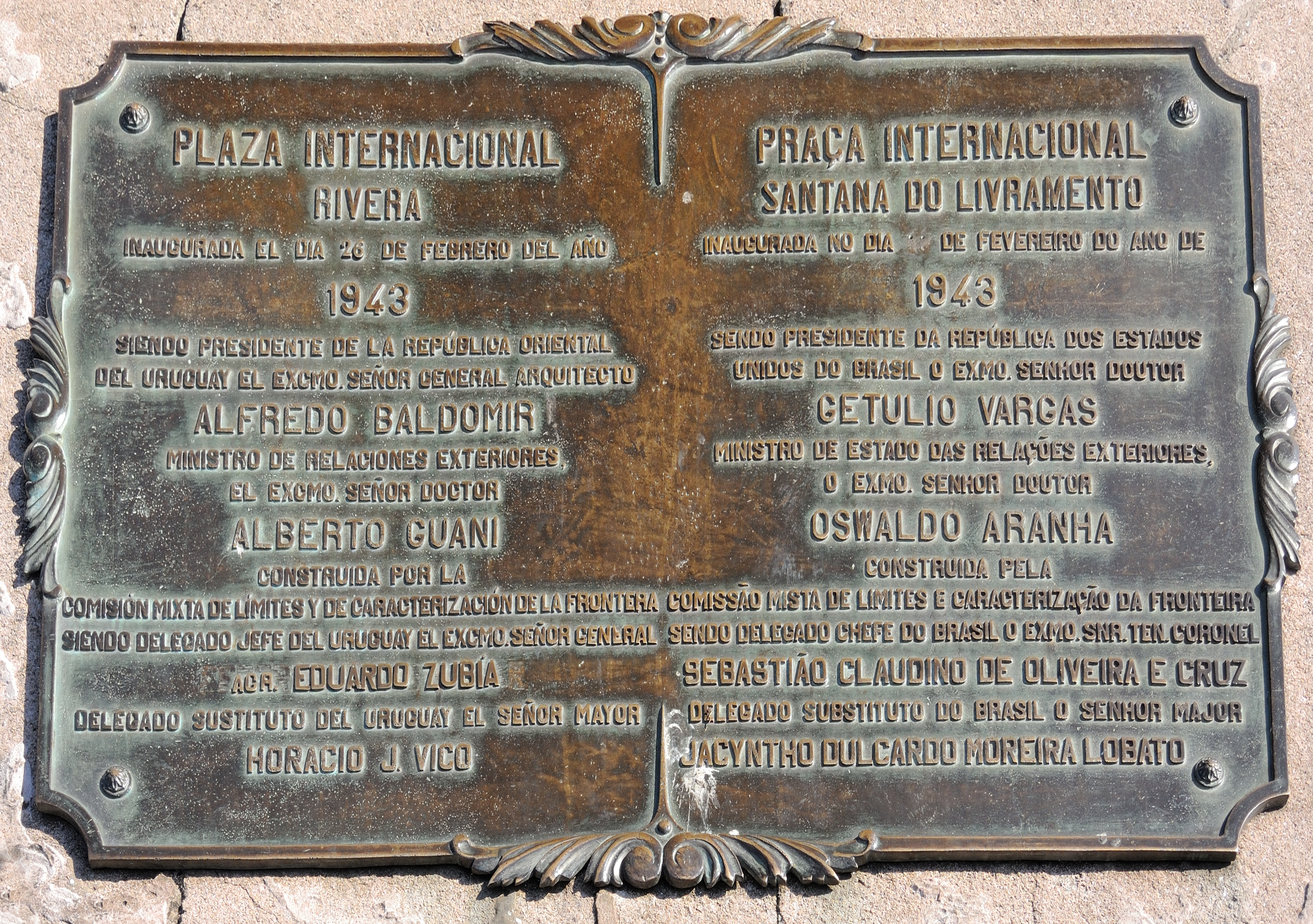 Placa colocada en la Plaza Internacional situada en el límite entre Brasil y Uruguay en la ciudad de Rivera y Livramento.